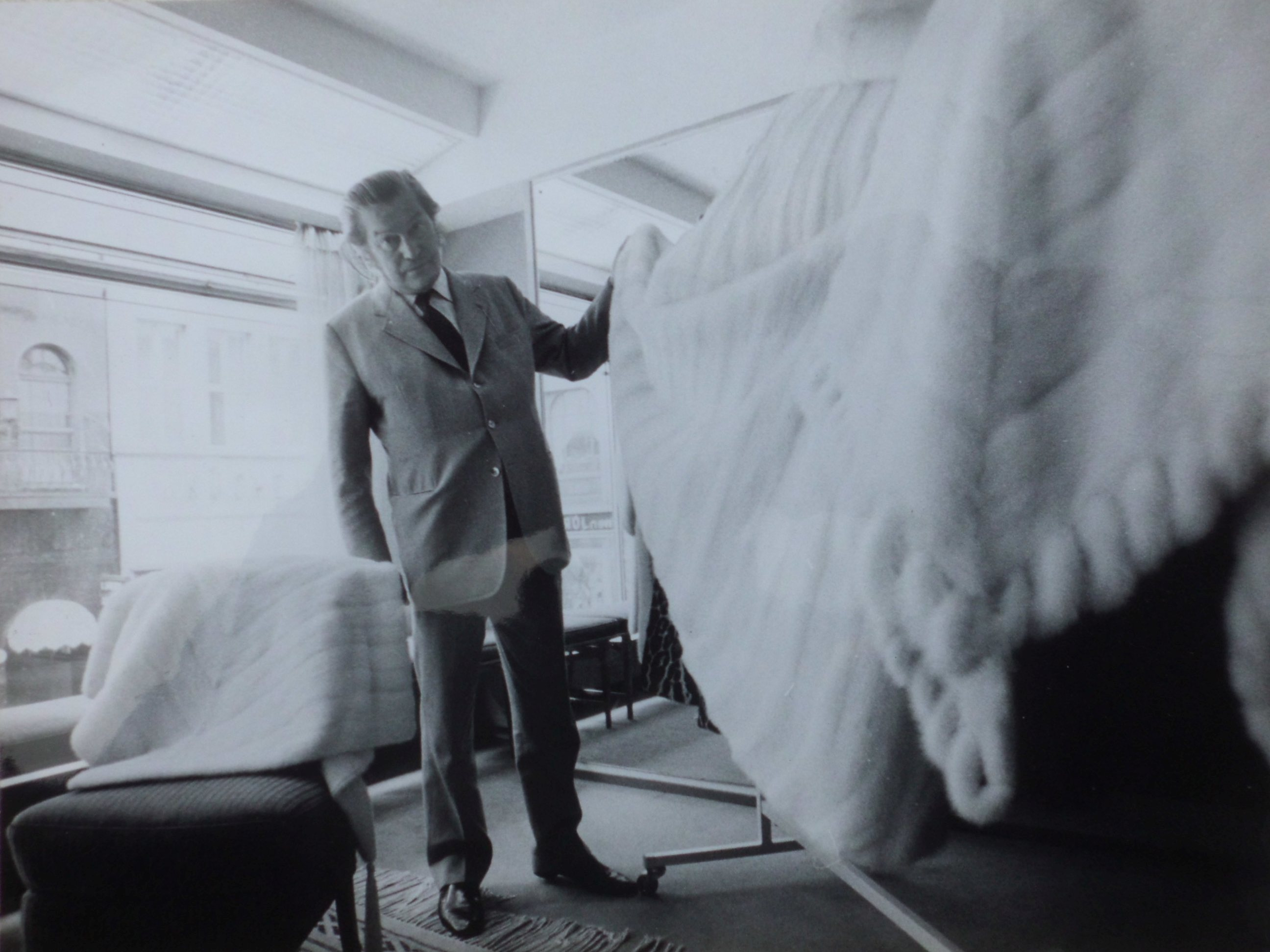 Edelpelze Otto Berger, Neuer Wall, Hamburg. Otto Berger präsentiert einen ausgelassen verarbeiteten Jasmin-Nerzmantel.